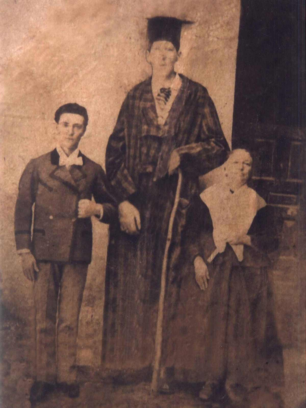 Fotografía única Gigante y su madre